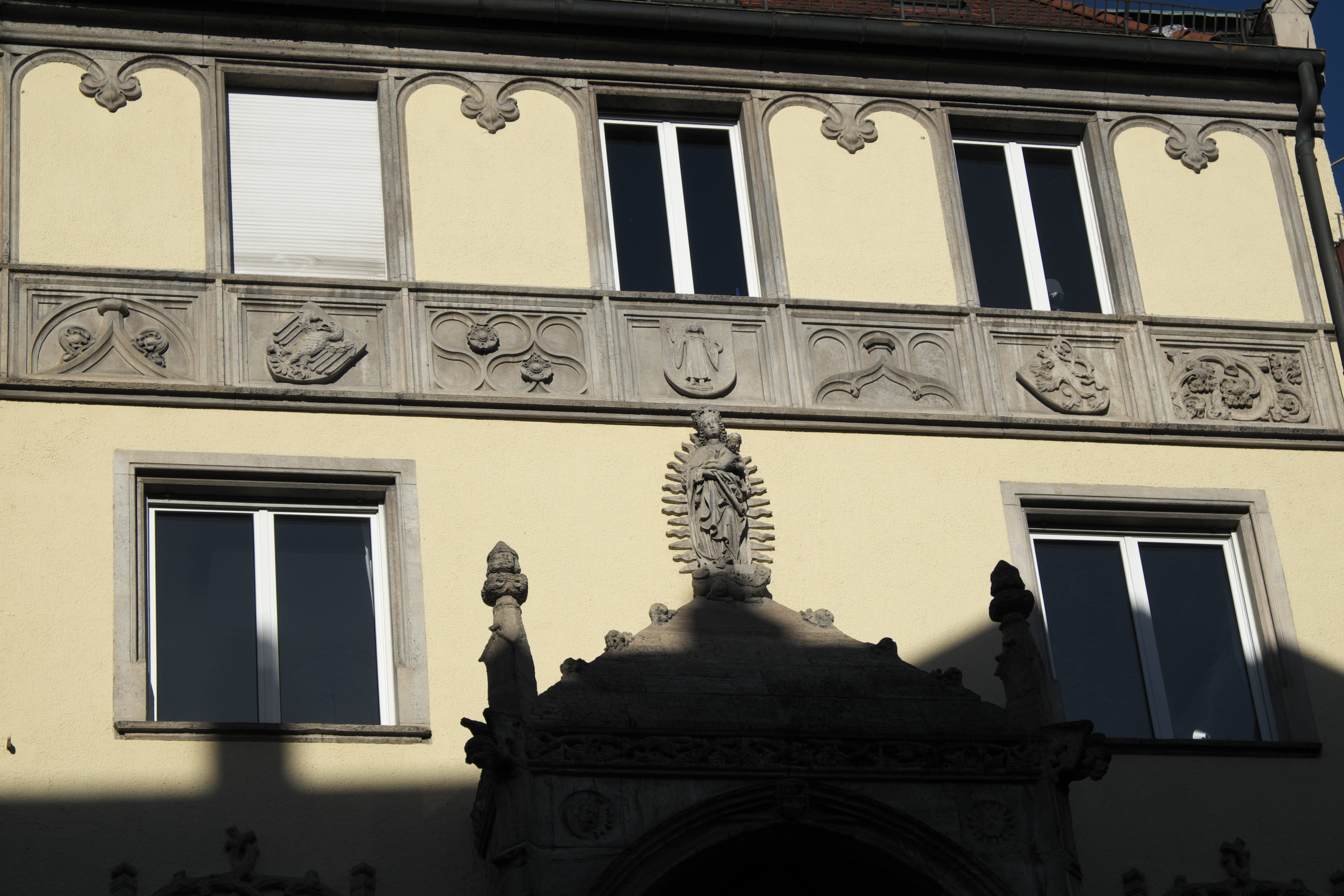 Wohn- und Geschäftshaus in der Sendlinger Straße 56 in der Altstadt im Stadtbezirk Altstadt-Lehel in München (Bayern/Deutschland)